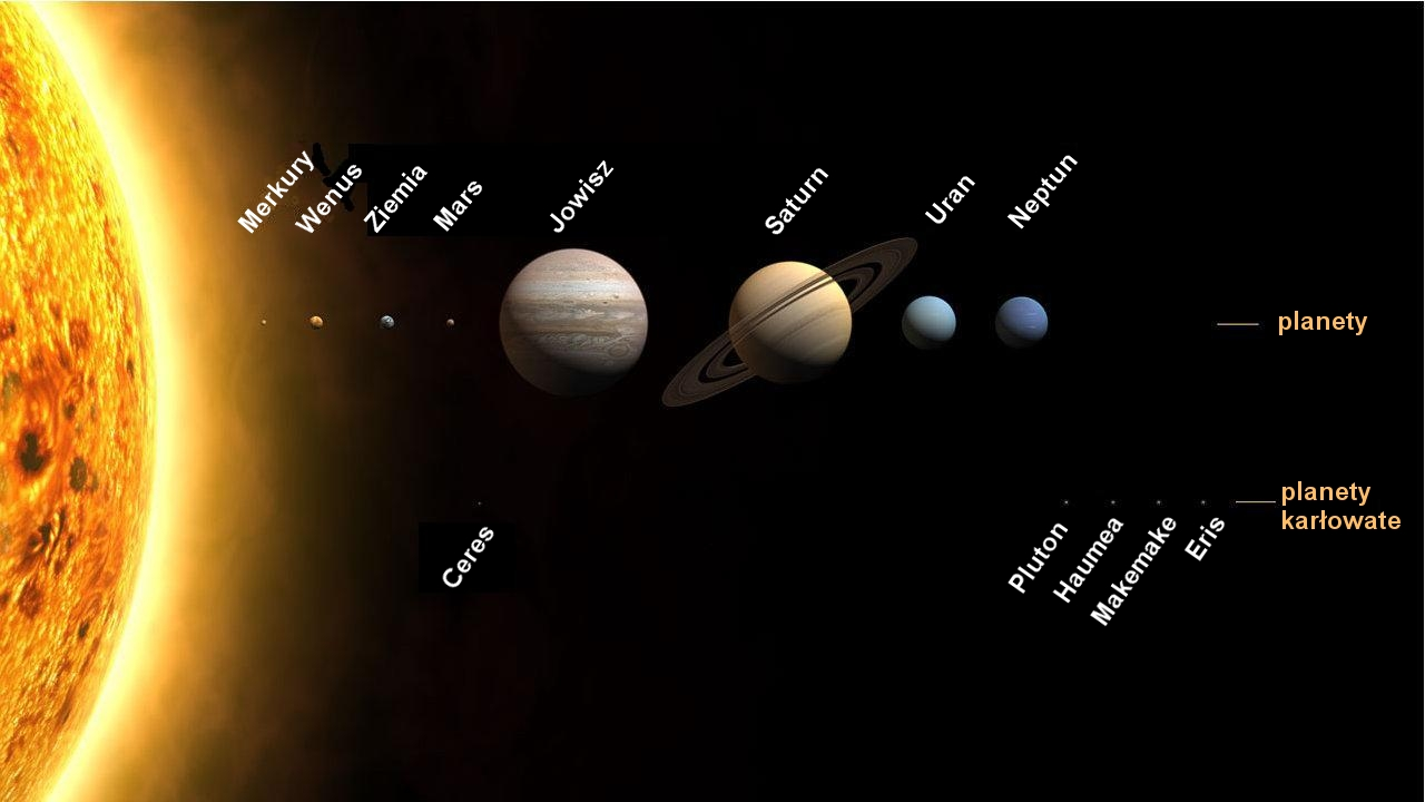 Planety i planety karłowate Układu Słonecznego wg IAU z 2008.